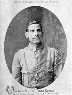 El general villista Toribio Ortega